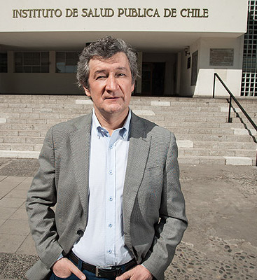 Alex Figueroa Muñoz